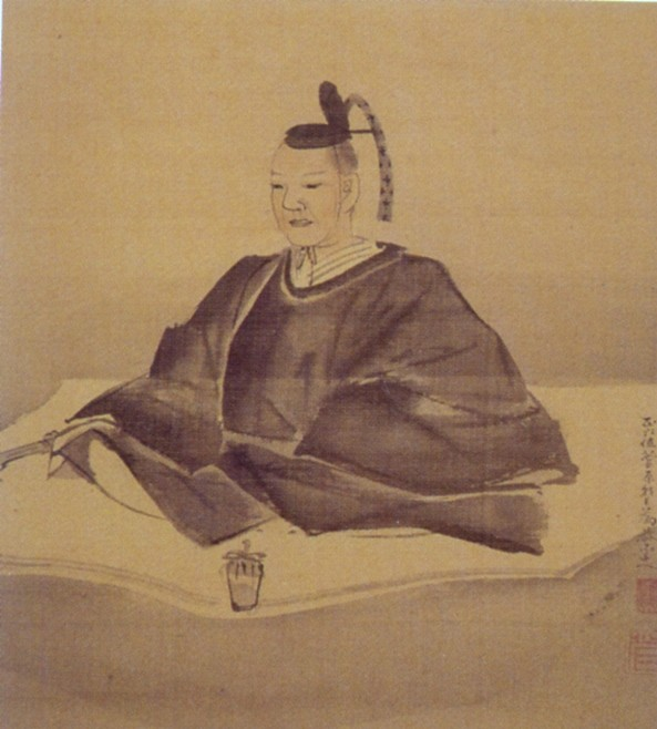 小堀遠州。Kobori Ensyu.